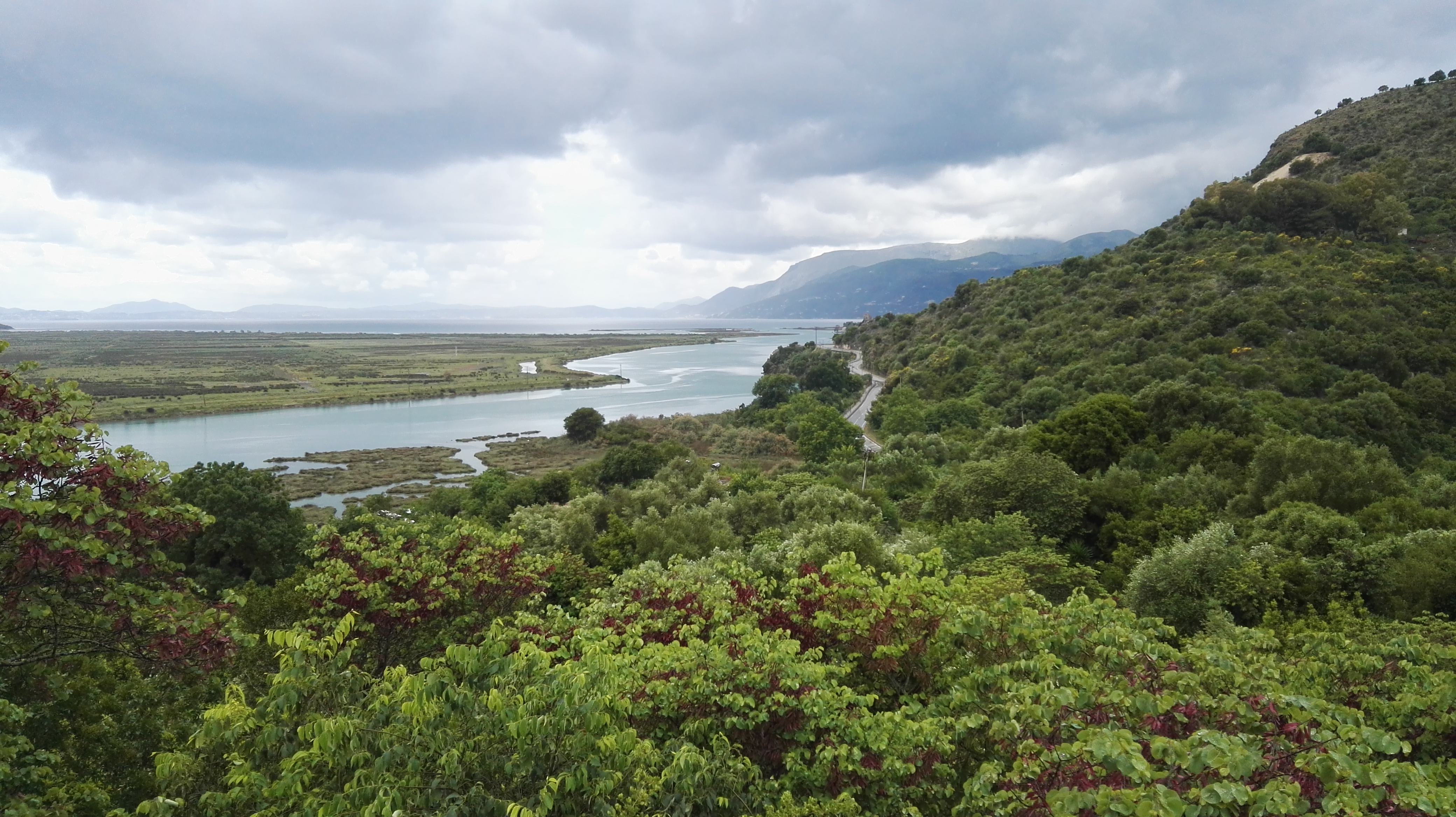 Weltkulturerbestätte in Butrint in Albanien; Vivari-Kanal